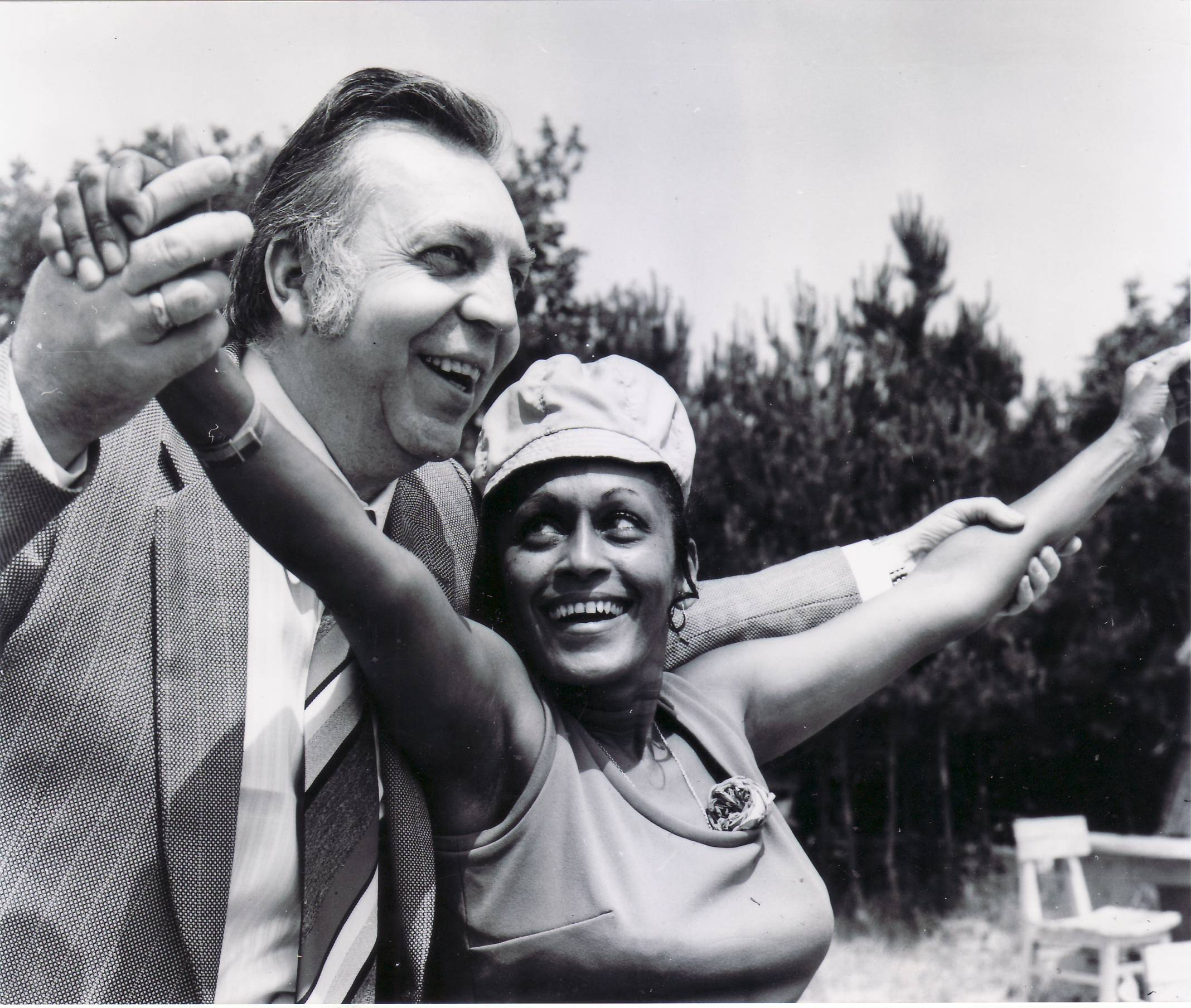 Георги Ганев със световно известната джаз певица Омара Портуондо - Куба по време на МФ „Златният Орфей” през 1974 г.